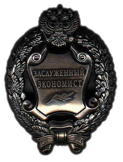 Заслуженный экономист Российской Федерации. Нагрудный знак.